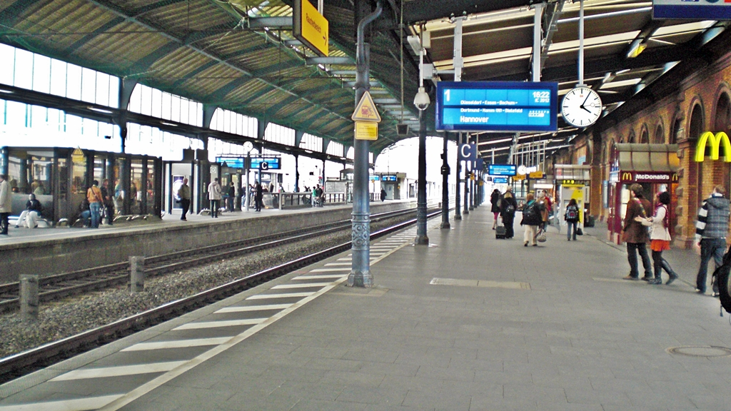 Bonn Hauptbahnhof, Bahnsteighalle mit neuen Zugzielanzeigern